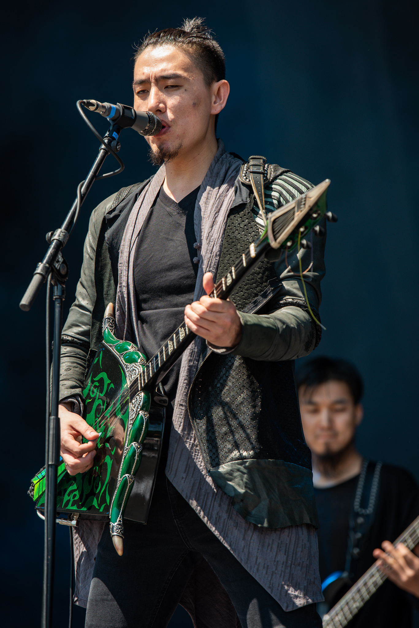 ARGO-Konzerte,Beck's Park Stage,Konzert,Livekonzert,Livemusik,Musik,RiP,Rock im Park 2019,The Hu